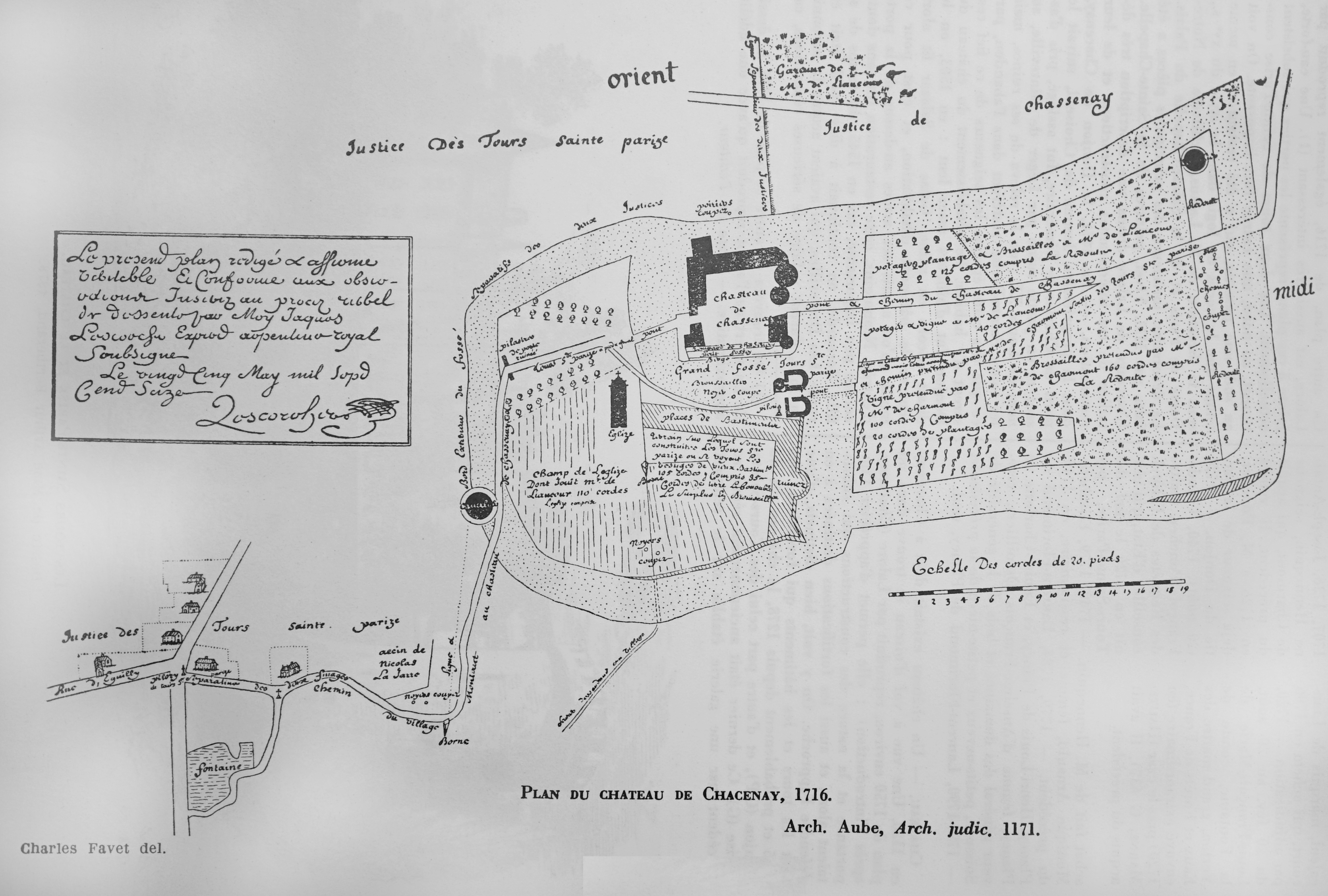 vue ancienne du château.